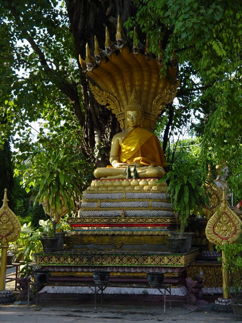 bouddha at Vat Simuong, Vientiane (Laos), 10/2003.